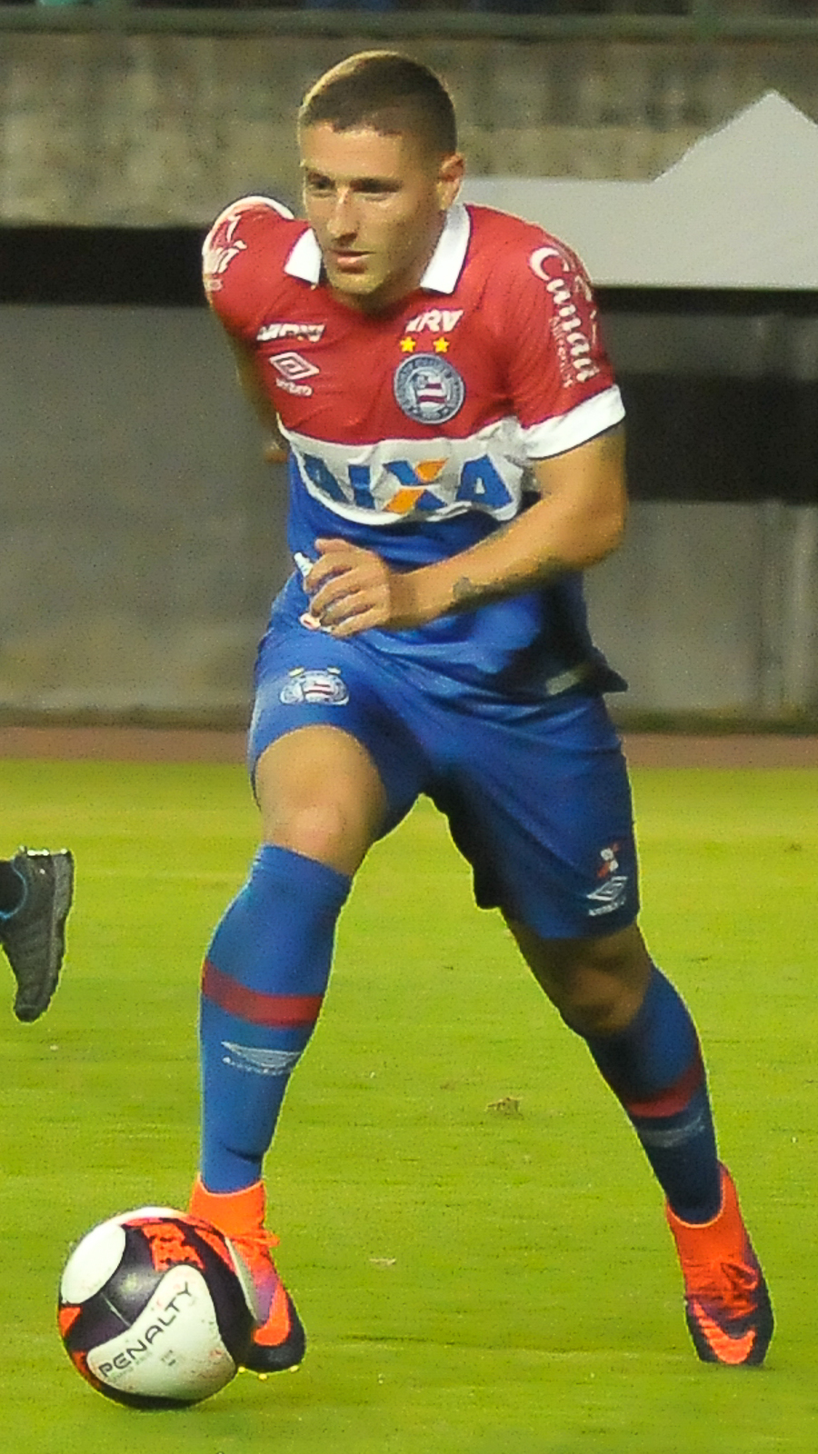 BahiaXJacobina